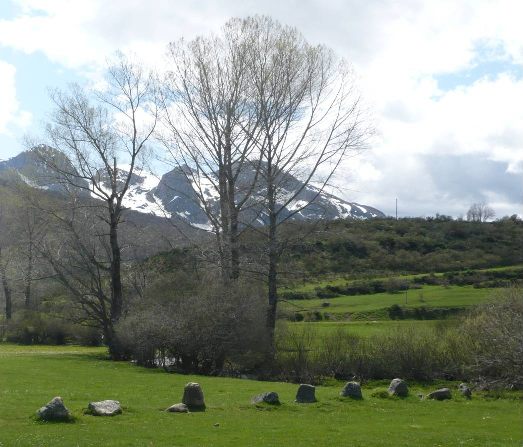 Vega Lloso. piedras en hilera. La Uña.